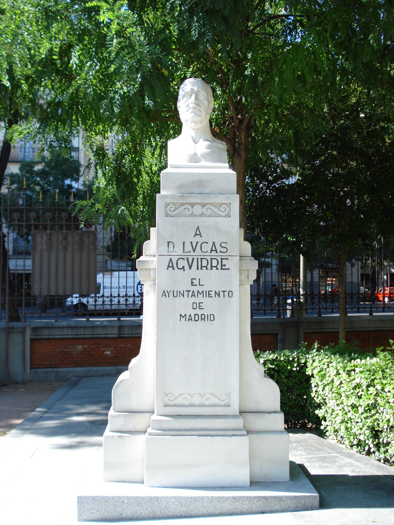 Busto de Lucas Aguirre en el recinto de las antiguas Escuelas Aguirre, en Madrid.